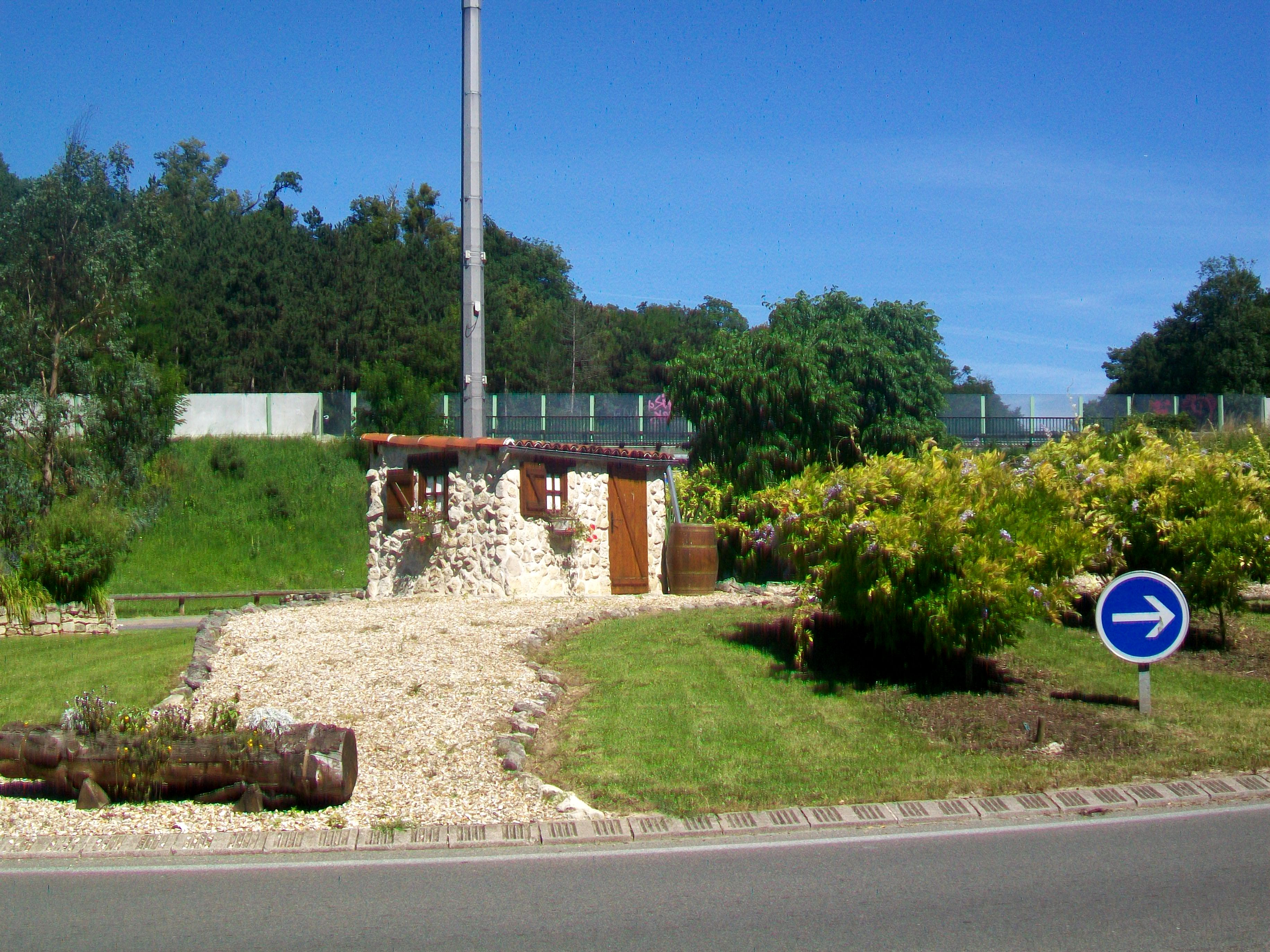 Le rond-point sur la RD 62 vers Laigneville.